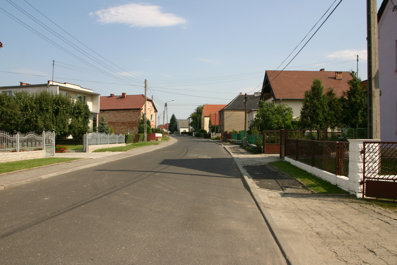 Twardawa – wies w Polsce położony w województwie opolskim, w powiecie prudnickim, w gminie Głogówek.